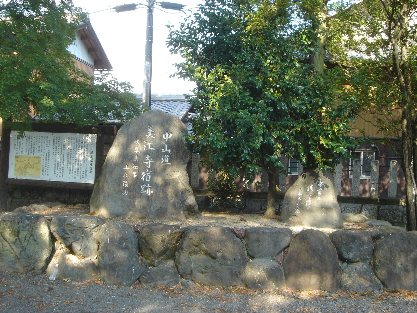 美江寺宿跡石碑、岐阜県瑞穂市の美江神社境内にて